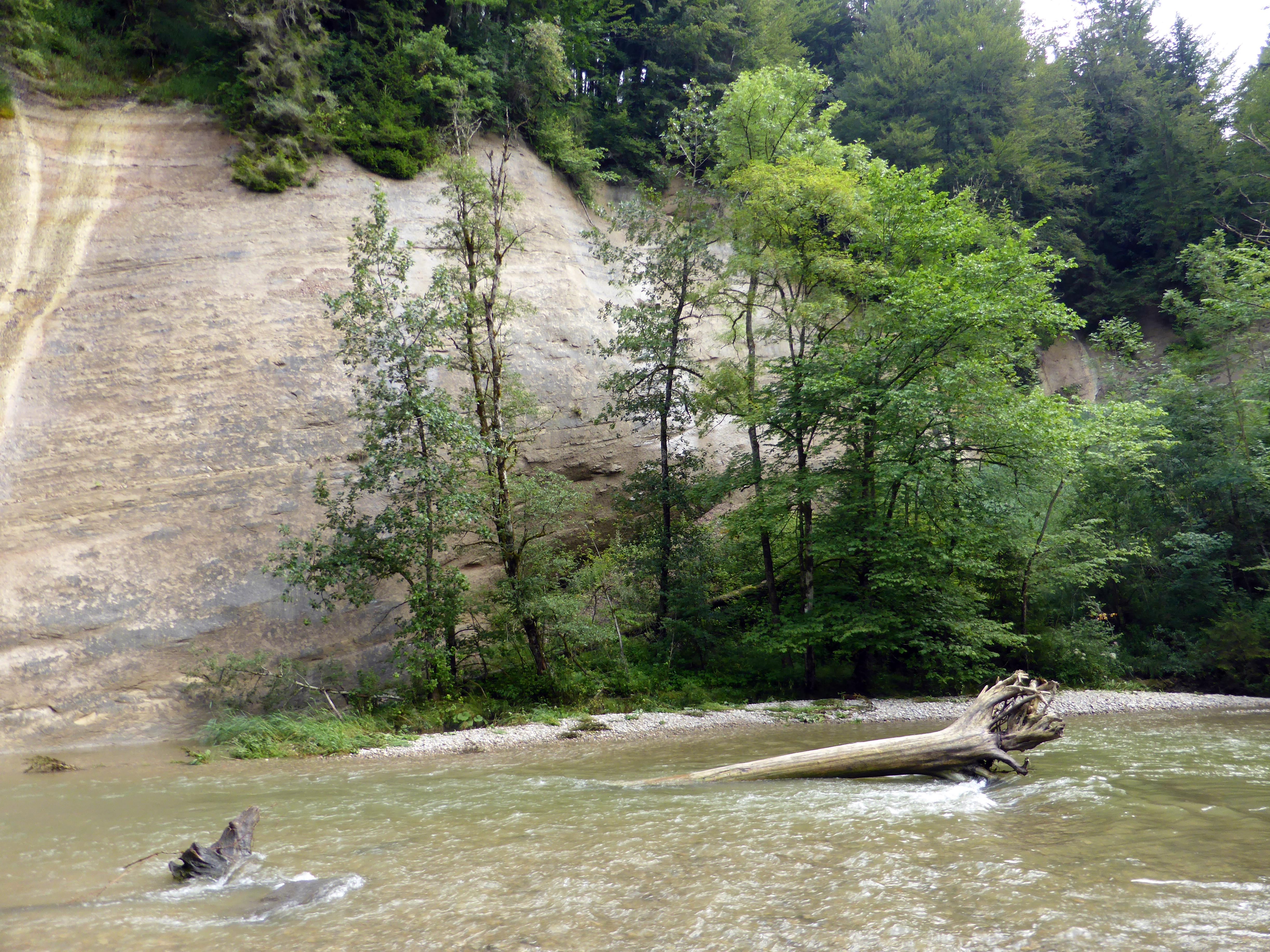 Der Eistobel zwischen der Ortschaft Schüttentobel und der Argentobelbrücke im Westallgäu.